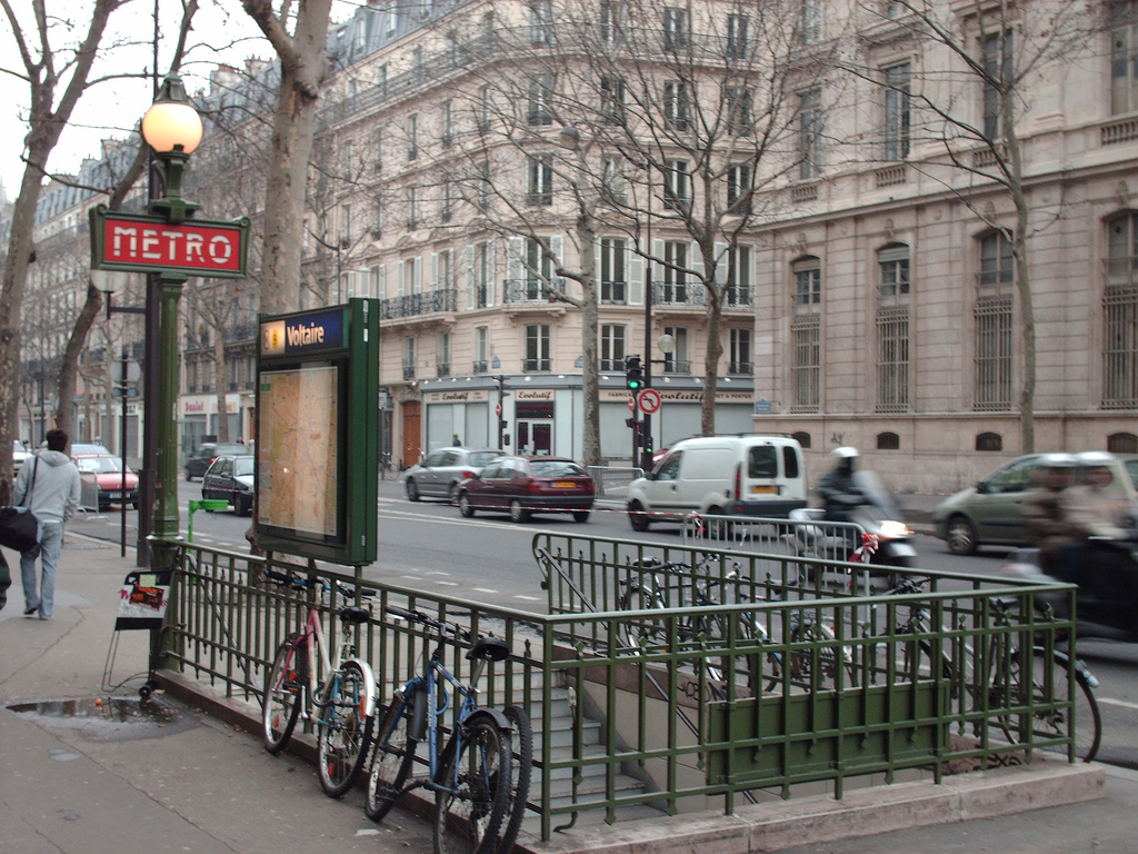 Uno de los barrios parisinos en los que he vivido